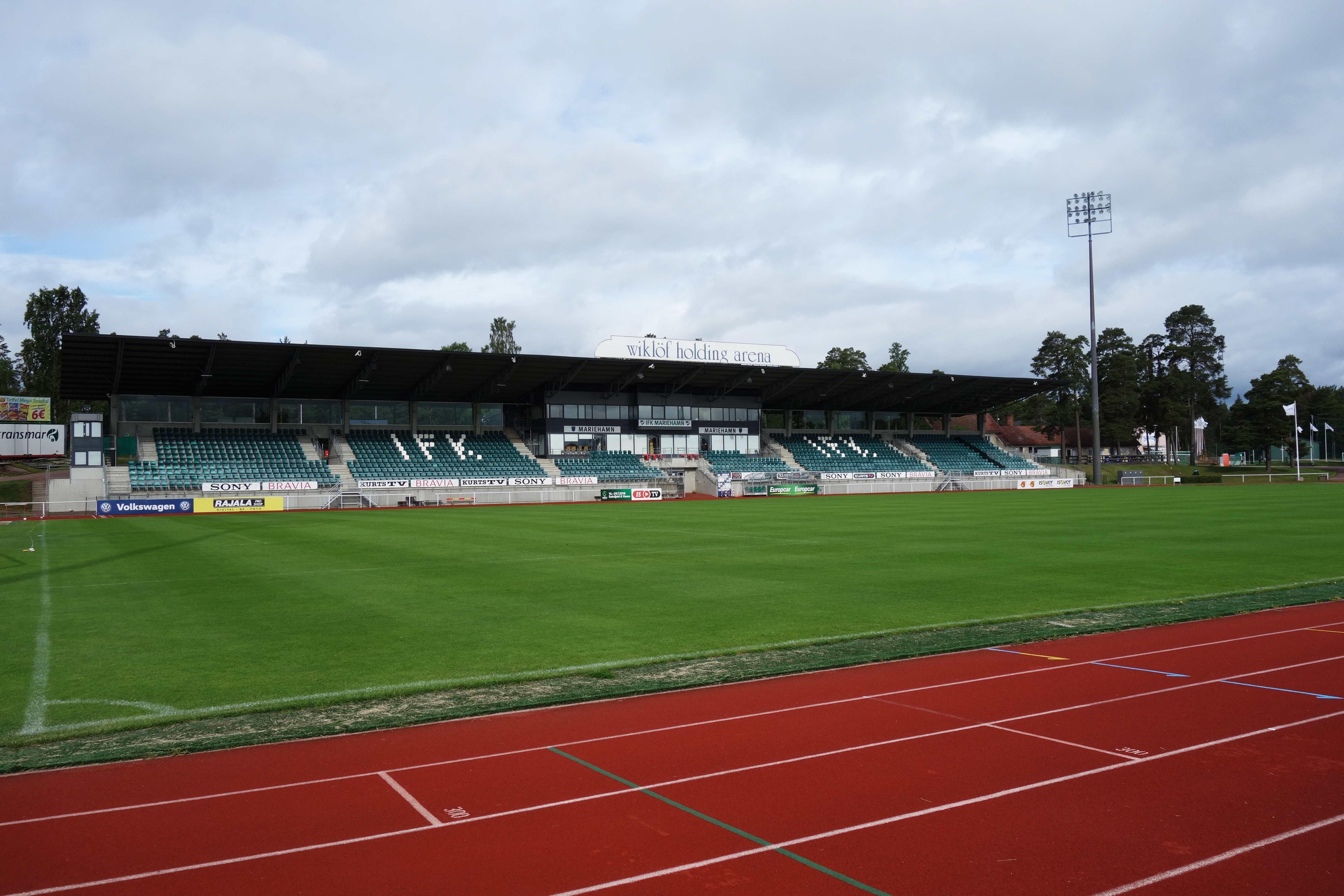 Wiklöf Holding Arena 4.7.2017